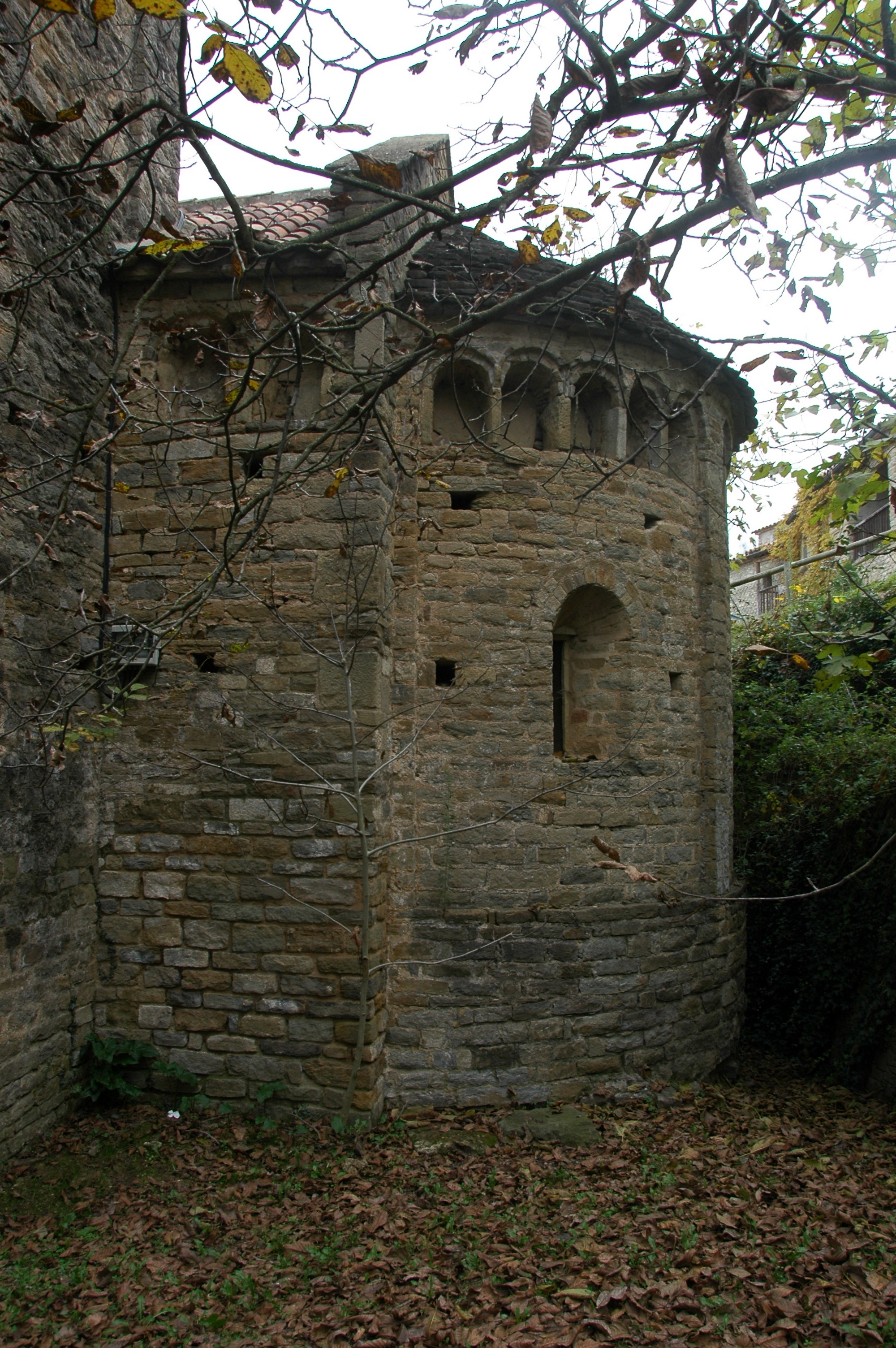 Església de Sant Esteve de Tavèrnoles